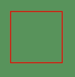 Kvarlatero